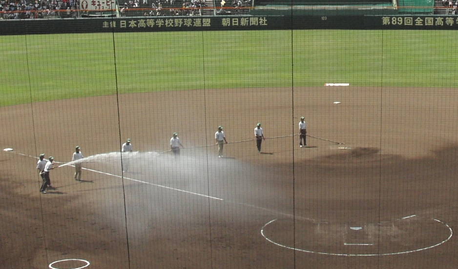 Hanshin Koshien Stadium